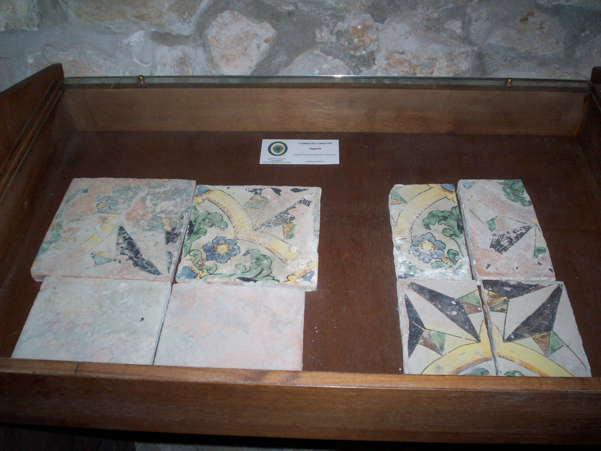 riggiole in ceramica settecentesca nel museo civico di Cerreto Sannita - Ceramica di Cerreto Sannita e di San Lorenzello